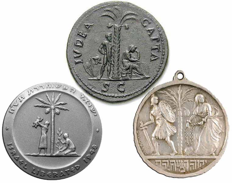 המטבע הרומי עם הואריאציות שנטבעו בארץ ישראל